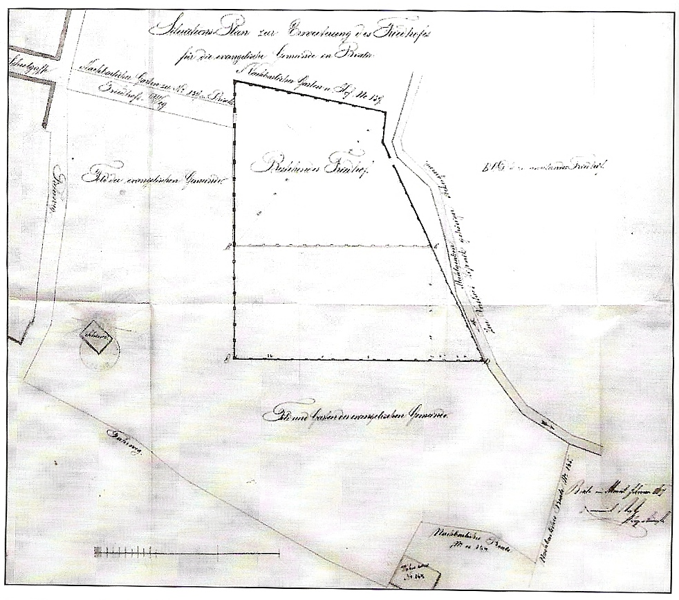 Plan sytuacyjny cmentarza ewangelickiego w Bielsku-Białej przy ul. Piłsudskiego z 1867 roku.